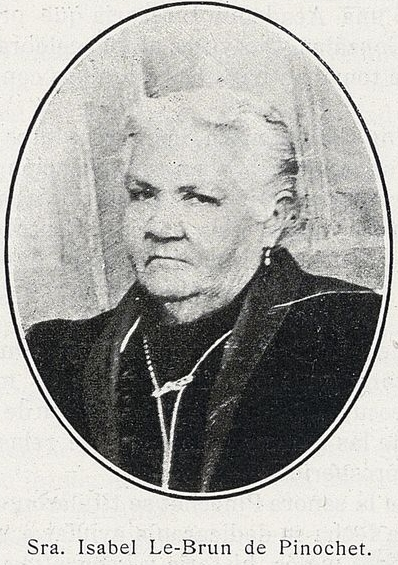 Isabel Lebrun de Pinochet, hacia 1895. En Actividades femeninas en Chile : obra publicada con motivo del cincuentenario del decreto que concedió a la mujer chilena el derecho de validar sus exámenes secundarios : (datos hasta Diciembre de 1927) / [compilado por] Sara Guerín de Elgueta. Santiago : Imprenta y Litografía La Ilustración, 1928. 757 páginas